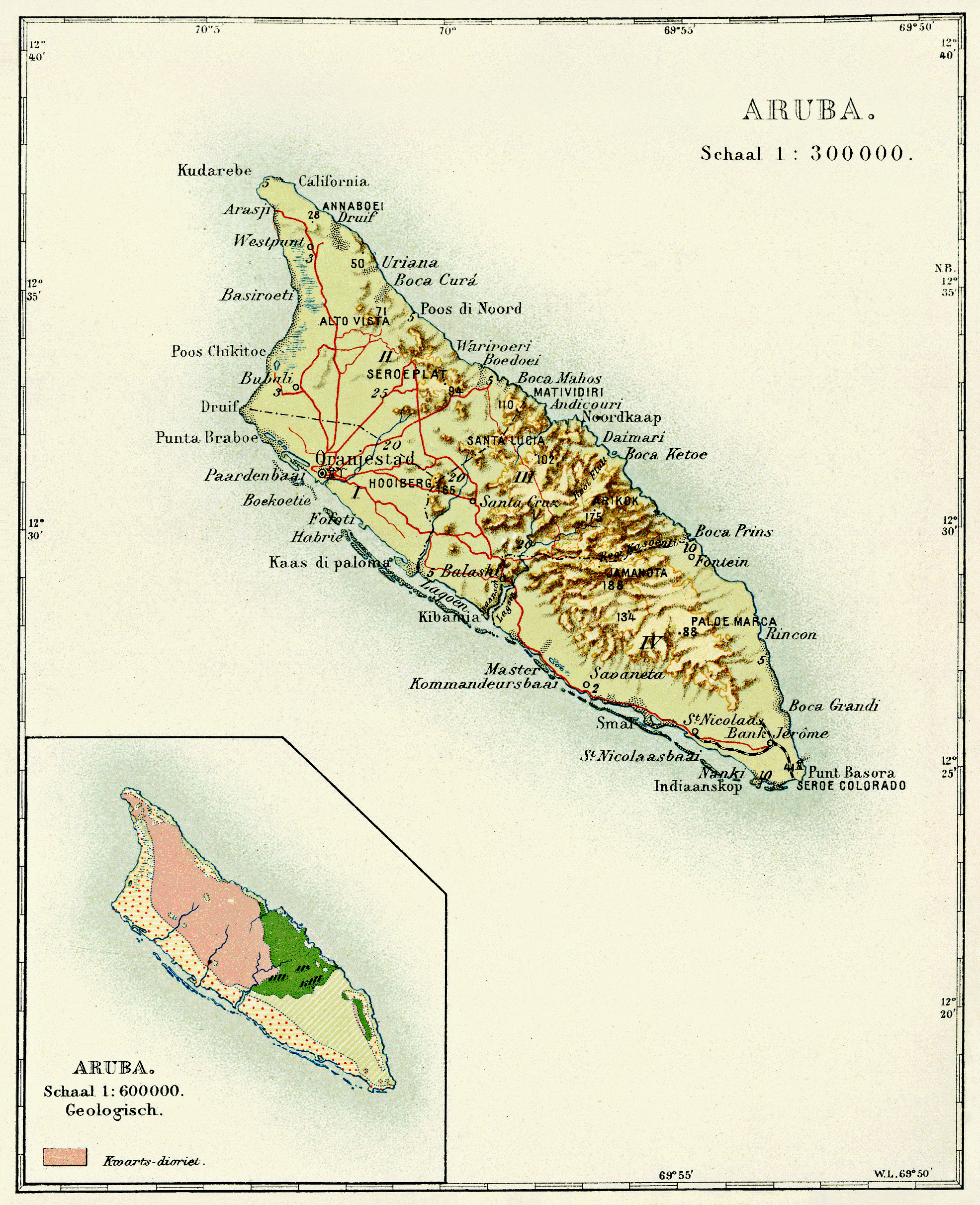 Aruba - Karte aus der Enzyklopädie der Niederländischen Antillen.